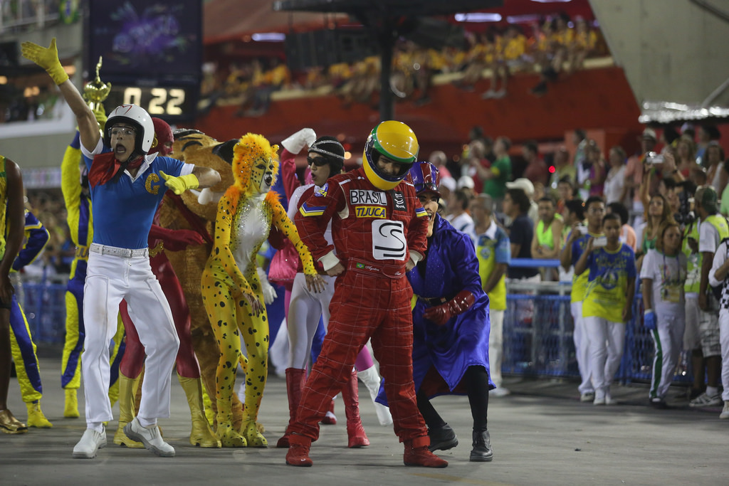 Unidos da Tijuca é campeã do Carnaval do Rio.